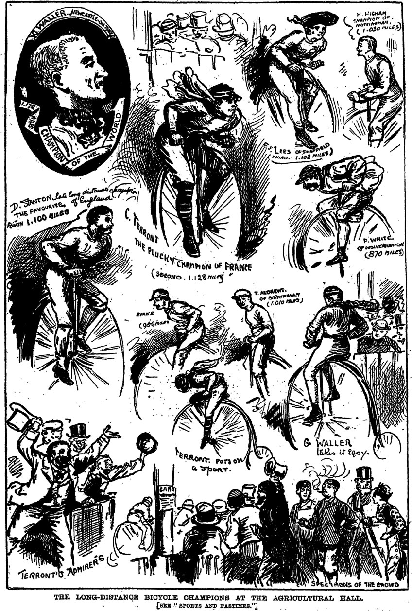 Illustration aus der Penny Illustrated v. 10. Mai 1979 mit Fahrern von Sechstagerennen